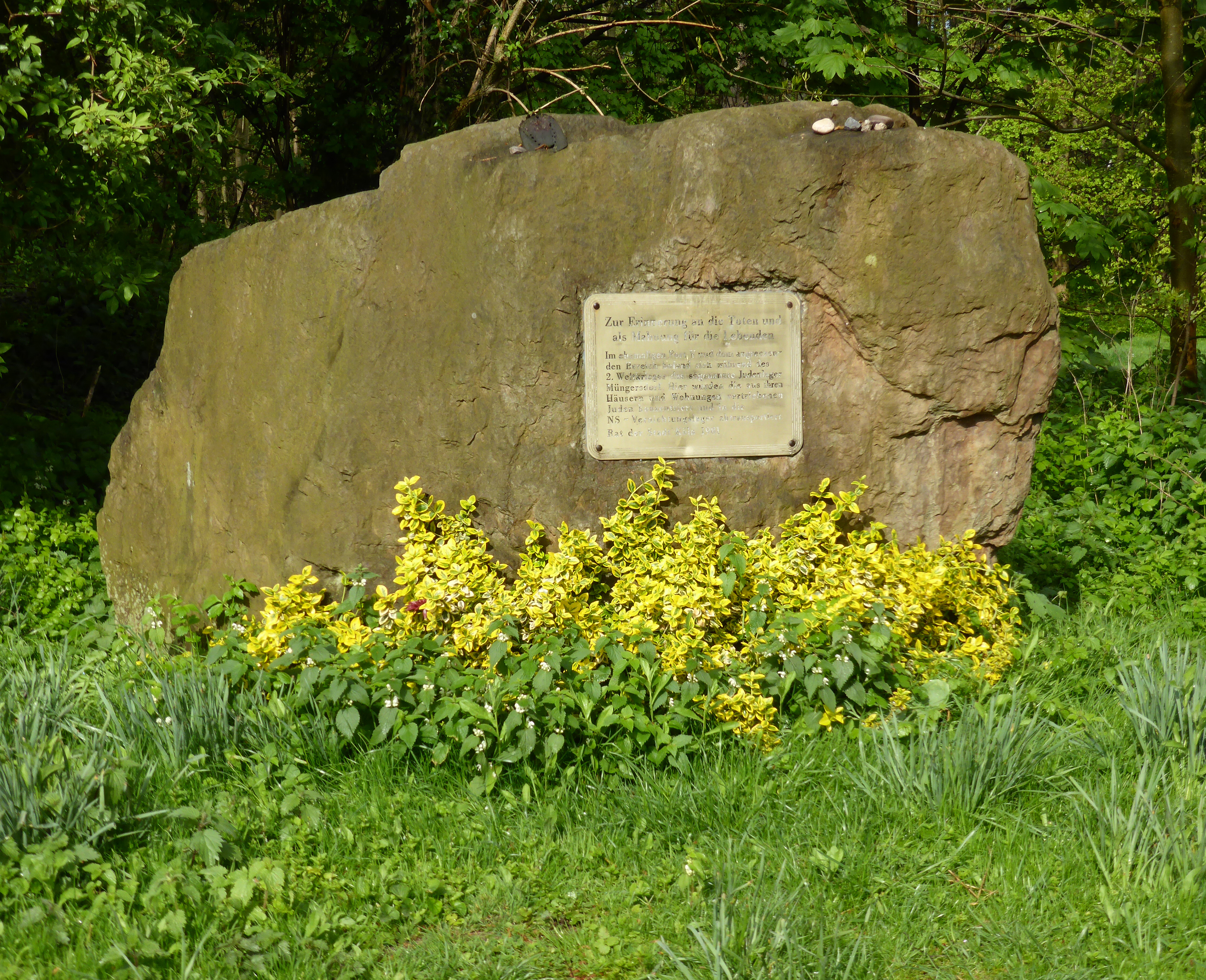 Festungsring Köln: Gedenkstein Fort V Müngersdorf.